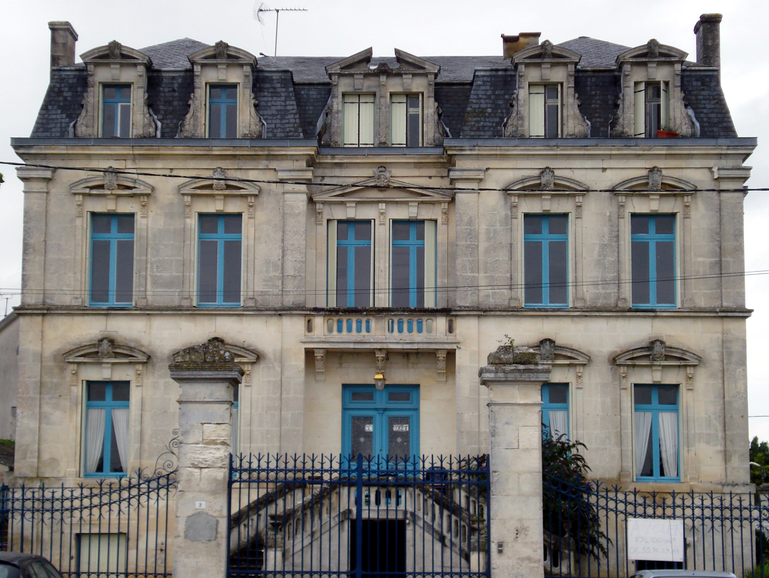 Un hôtel particulier devenu l'école des filles d'Aulnay de Saintonge durant le XXe siècle.